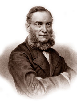 Виктор Яковлевич Буняковский (1804-1889) изобрел самосчеты, которые базировались на принципе связанных цифровых колес